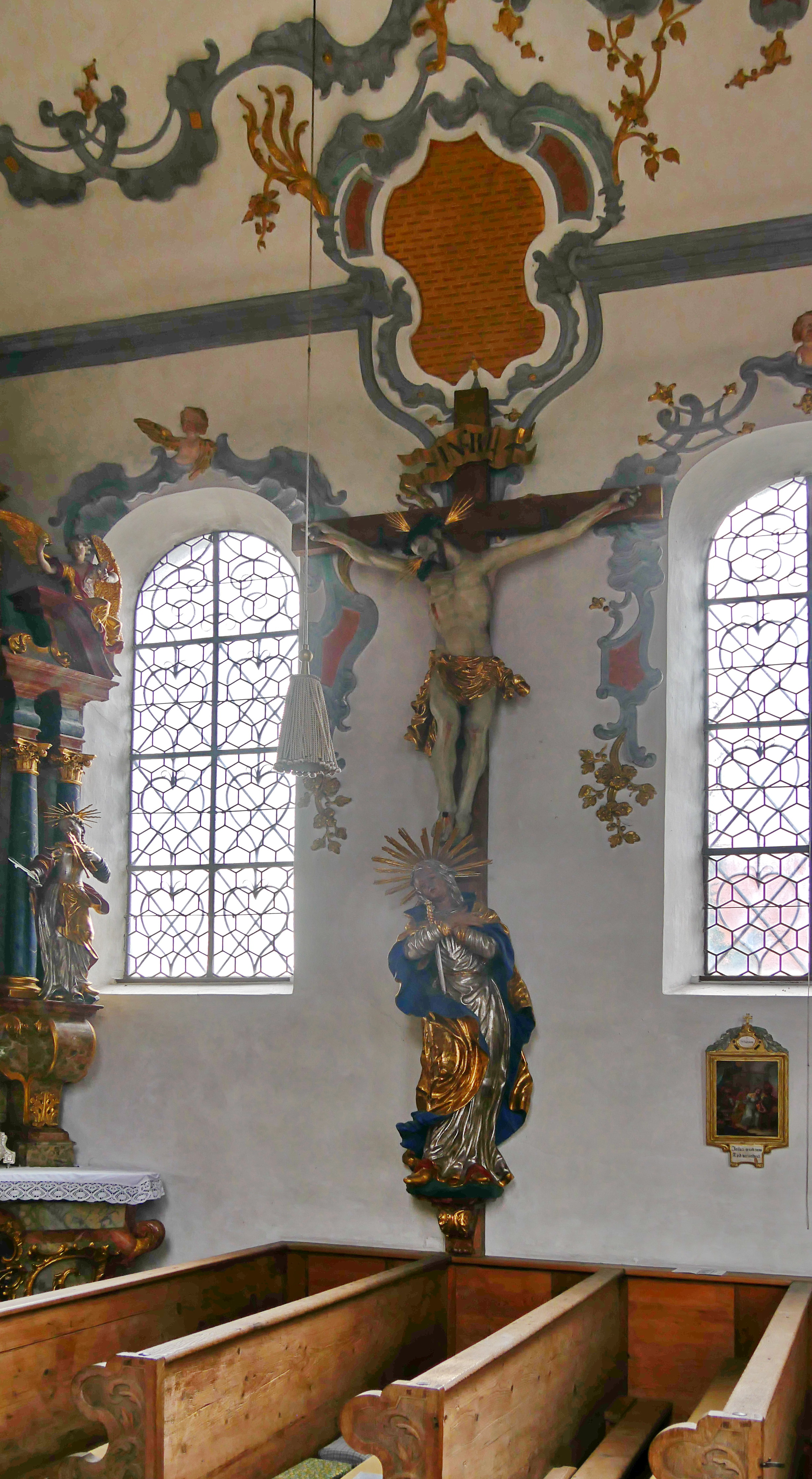 Finning, Ortsteil Oberfinning, Katholische Pfarrkirche Heilig Kreuz: Kanzelkreuz mit der Schmerzensreichen Gottesmutter zu Füssen Christi